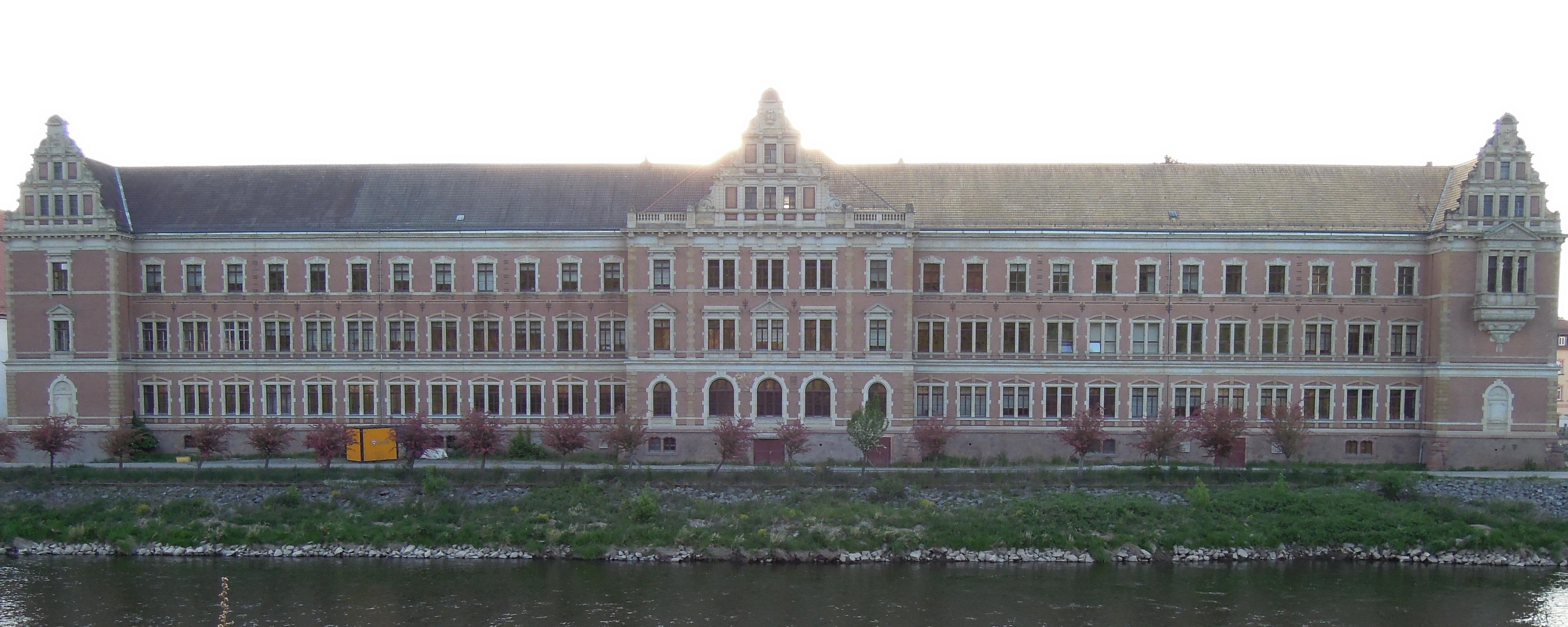 Grimmaer Gymnasium Sankt Augustin 2015